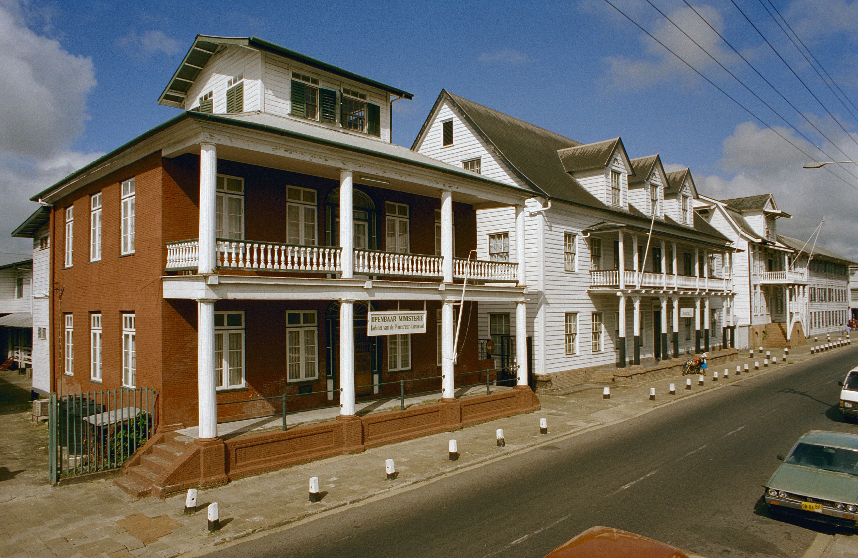 Openbaar Ministerie: Overzicht voorgevels en linker zijgevel (opmerking: Suriname Reis Loek Tangel)